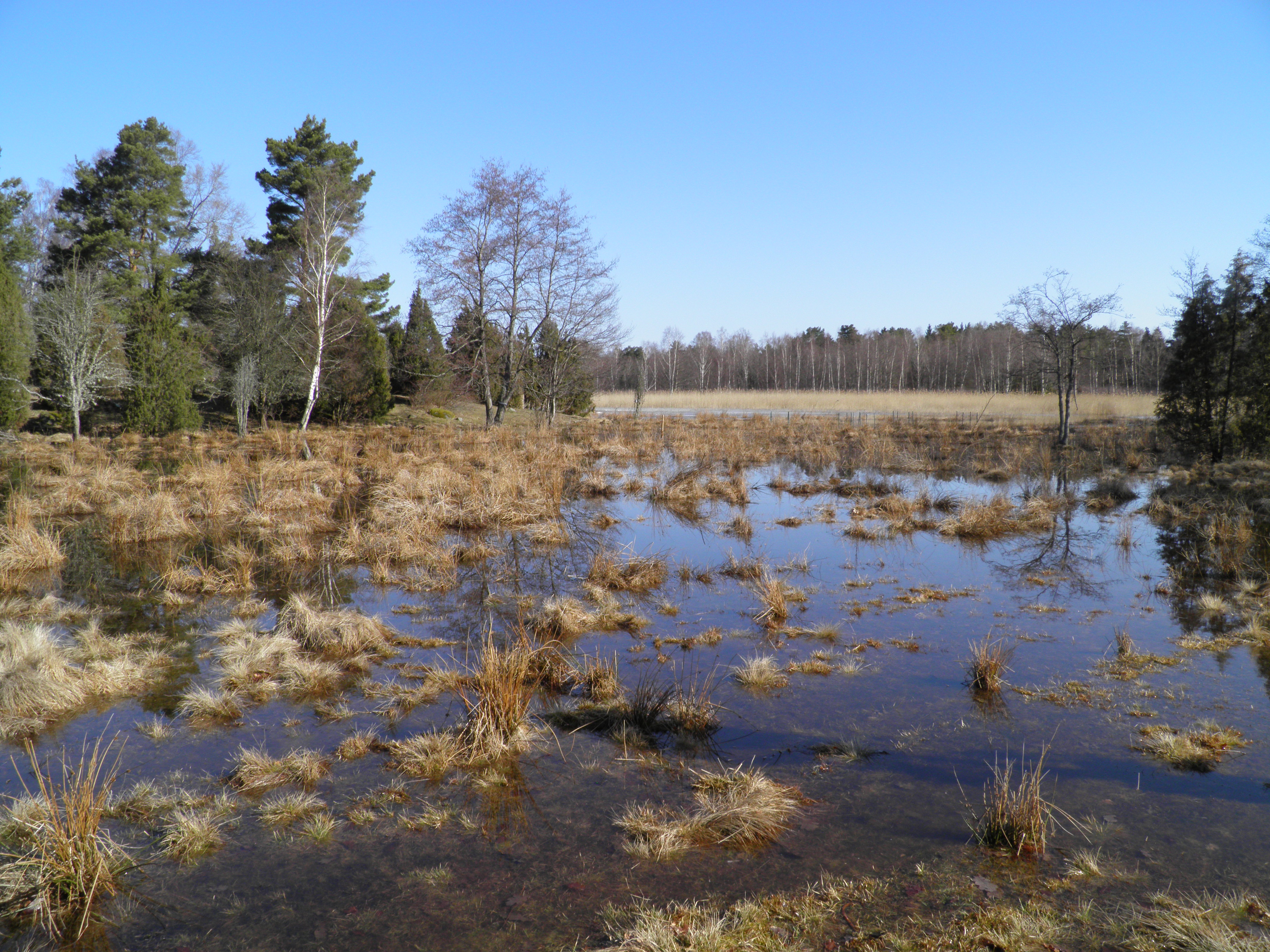 Renoverad våtmark, så kallad gäddfabrik, Kronobäcks våtmark, Mönsterås. Restored wetland, pike factory, Kronobäck, Mönsterås, Sweden.